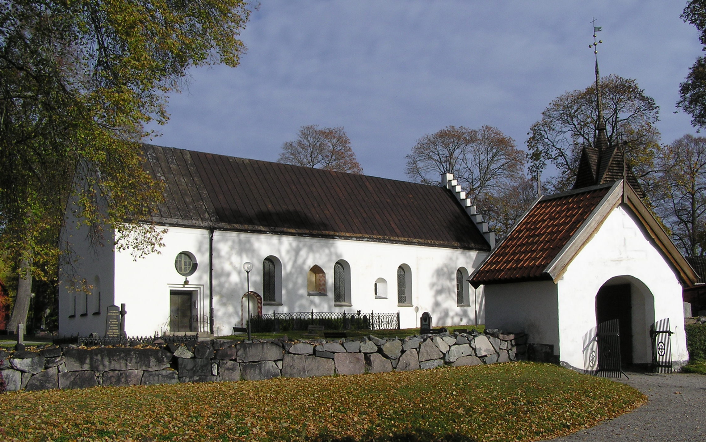 Lilla Malma kyrka, Malmköping.